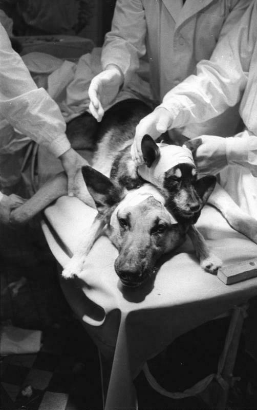 Zentralbild/Weiß 14.1.1959 Berlin- Letzte Kopftransplantation des sowjetischen Physiologen Demichow in der DDR, Der international bekannte Physiologe Vladimir Demichow, Leiter des Laboratriums für Organtransplantationen des ersten Medizinischen Instituts Moskau, der sich zur Zeit in einem zirka dreiwöchigen Besuch in der DDR aufhält, führte am 13.1.1959 die letzte in der DDR gezeigte Kopftransplantation durch, die ebenso wie alle bisher in Berlin und Leipzig durchgeführten Herz-Gefäß- und Kopftransplantationen erfolgreich verlief. Mit dem geglückten Experiment demonstriert der sowjetische Gast erneut vor seinen Fachkollegen, unter denen sich namhafte Mediziner der DDR, wie Prof. Dr. Brugsch, Leiter der I. Medizinischen Klinik der Poliklinik der Charite; Prof. Dr. Zetkin und Prof. Dr. Baumann, Leiter des Forschungsinstituts für cortico-viscerale Therapie und Pathologie der Deutschen Akademie der Wissenschaften, befanden, die Leistungsfähigkeit des sowjetischen Gefäßnähgeräts , das in der Fachwelt als "Sputnik der Chirurgie" bezeichnet wird. UBz.: Nach Beendigung der Kopftransplantation. Bei beiden Köpfen sind Elektronen eingelegt (Verband) zwecks Durchführung Elektronenzephalographischer Untersuchung.